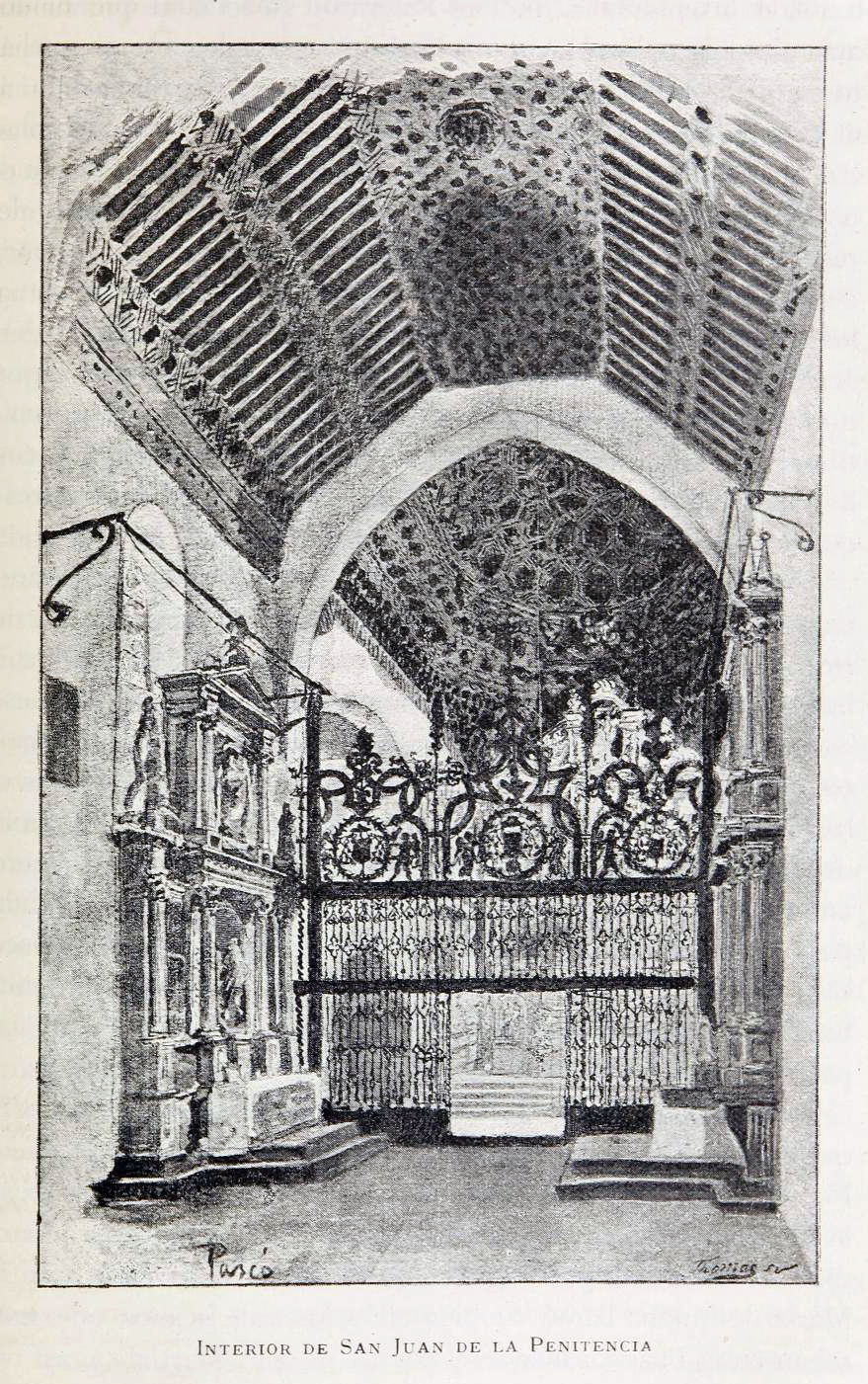 Interior de San Juan de la Penitencia, en Toledo.